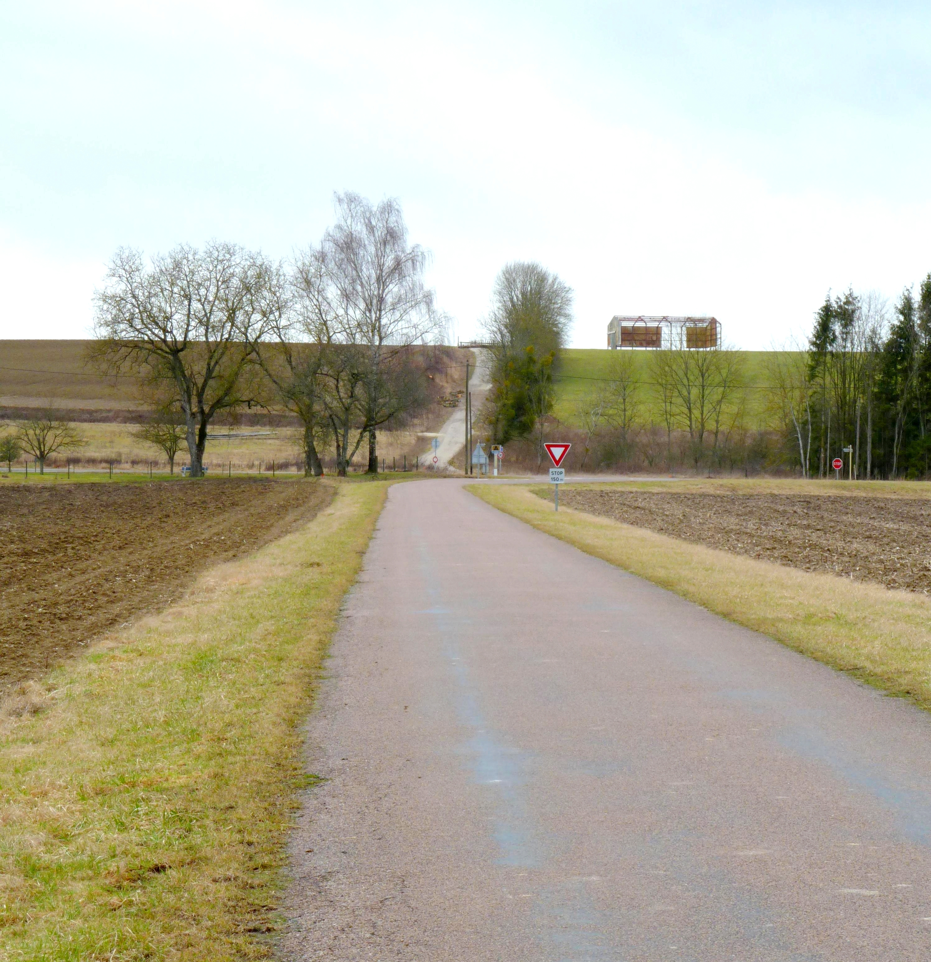 France, Nettancourt, Meuse (55) - L'intersection (nommée Ariola dans l'itinéraire d'Antonin) sur la voie romaine de Reims à Bar-le-Duc avec une autre voie venant de Châlons-sur-Marne (Duro Catelauni) via Charmont au sud et se dirigeant vers Stadunum (Sainte-Menehould) via Le Vieil-Dampierre au nord.